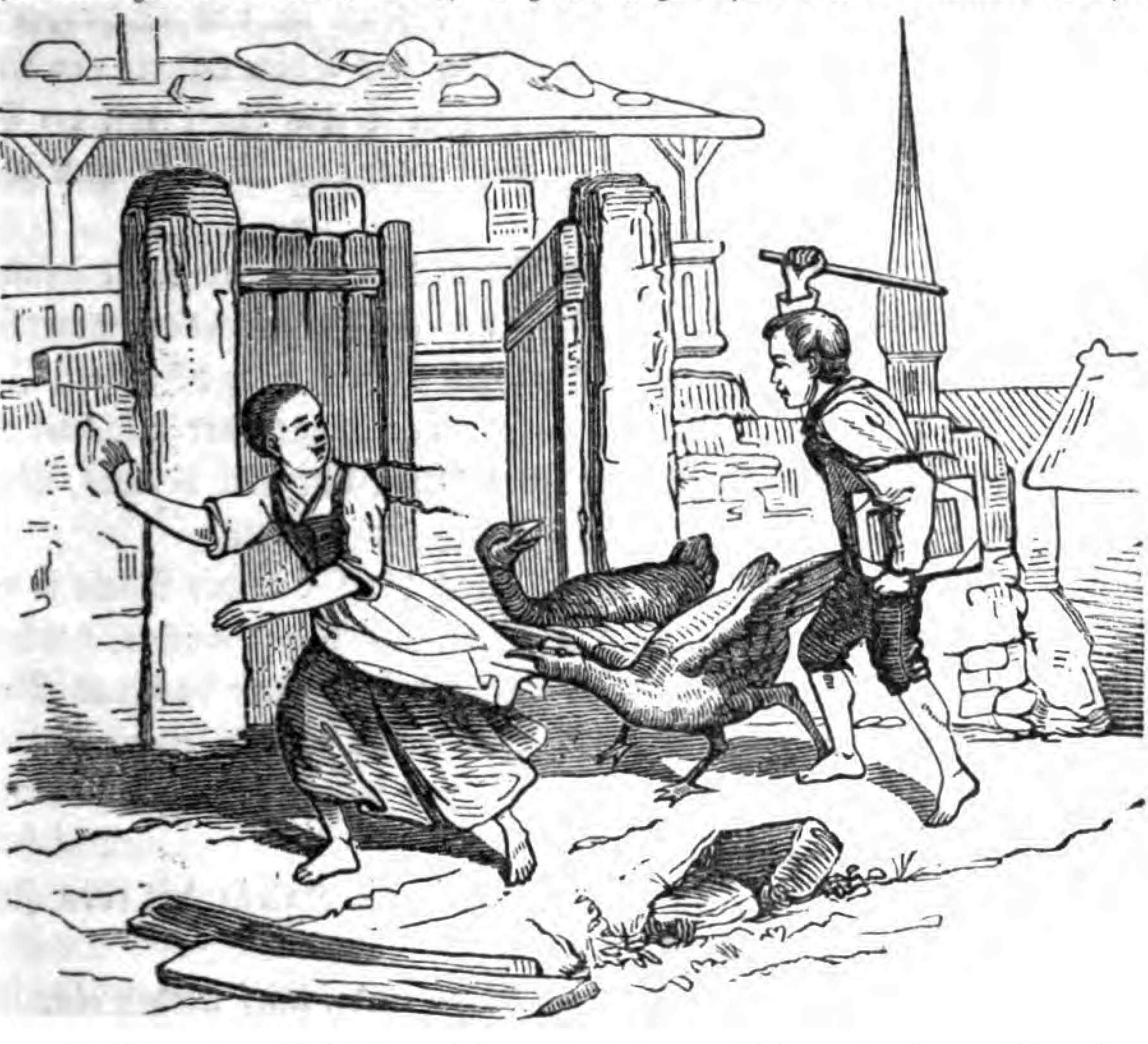 Berthold Auerbach, Schwarzwälder Dorfgeschichten, Ivo, der Hajrle. – Ivo verteidigt seine Freundin Emmerenz gegen die „Unholde“ der grauen Gänse.